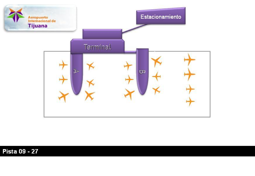 Diagrama de la terminal de Tijuana